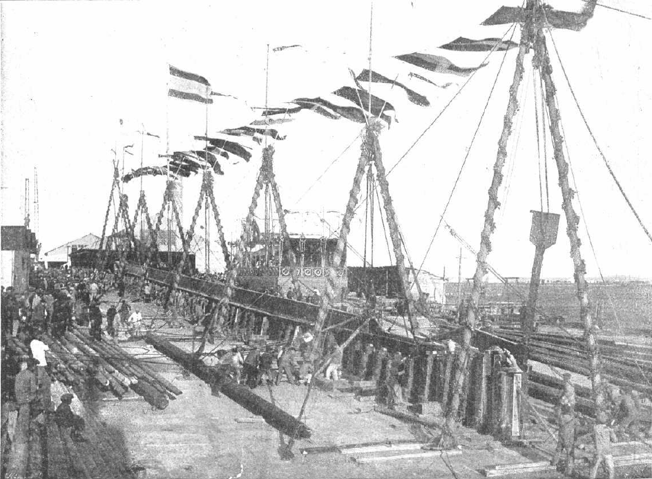 Fotografía publicada en 1914 que muestra el momento de colocación de la quilla en un buque construido por la Constructora Naval Española con destino a la Compañía Trasatlántica Española